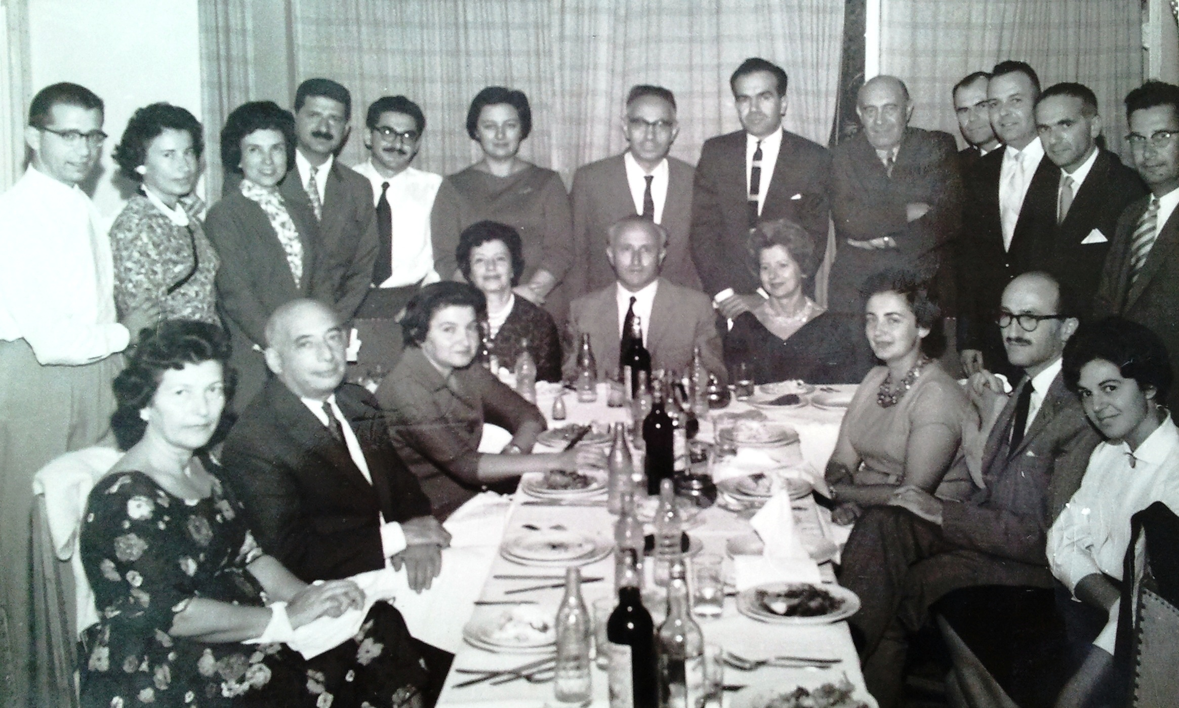 אשר גליברמן